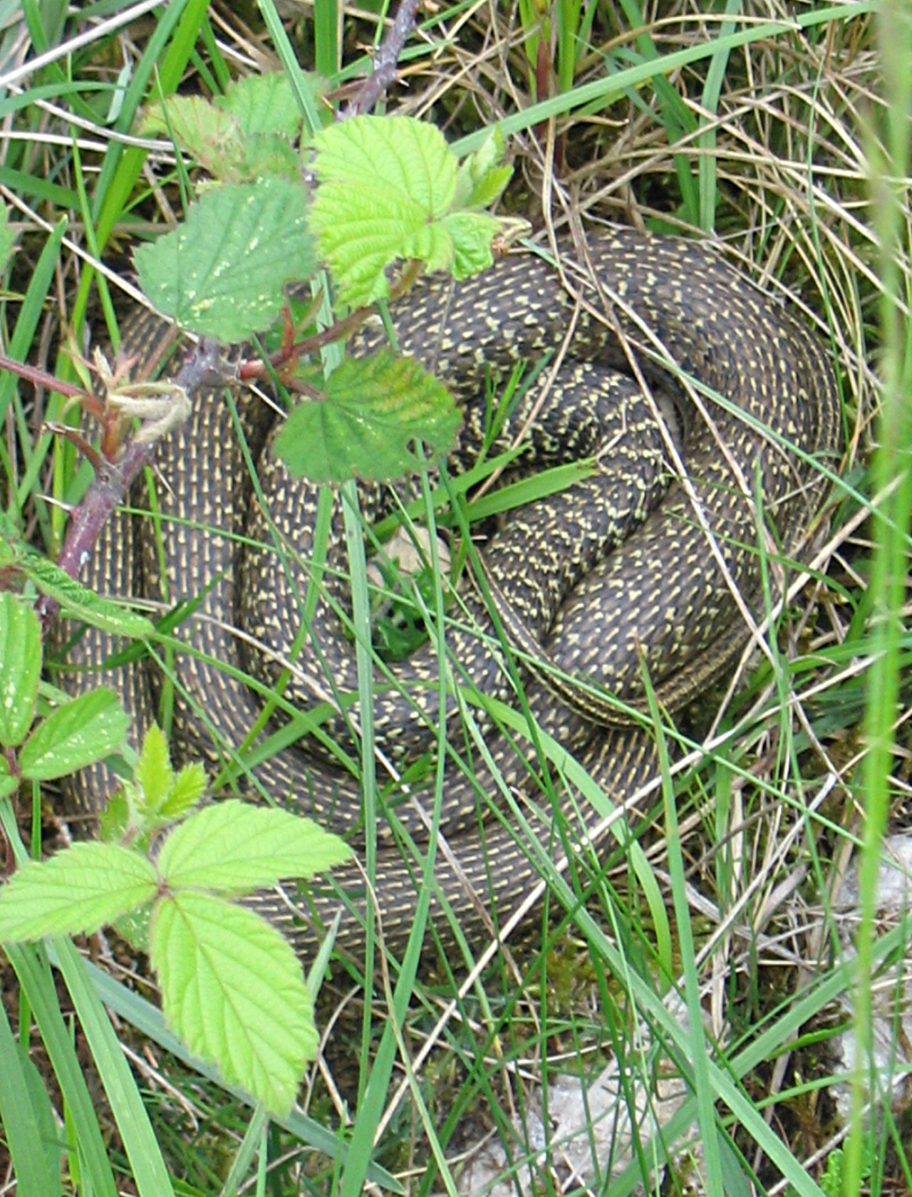 Hierophis viridiflavus picture from Office de tourisme des monts de Gy France